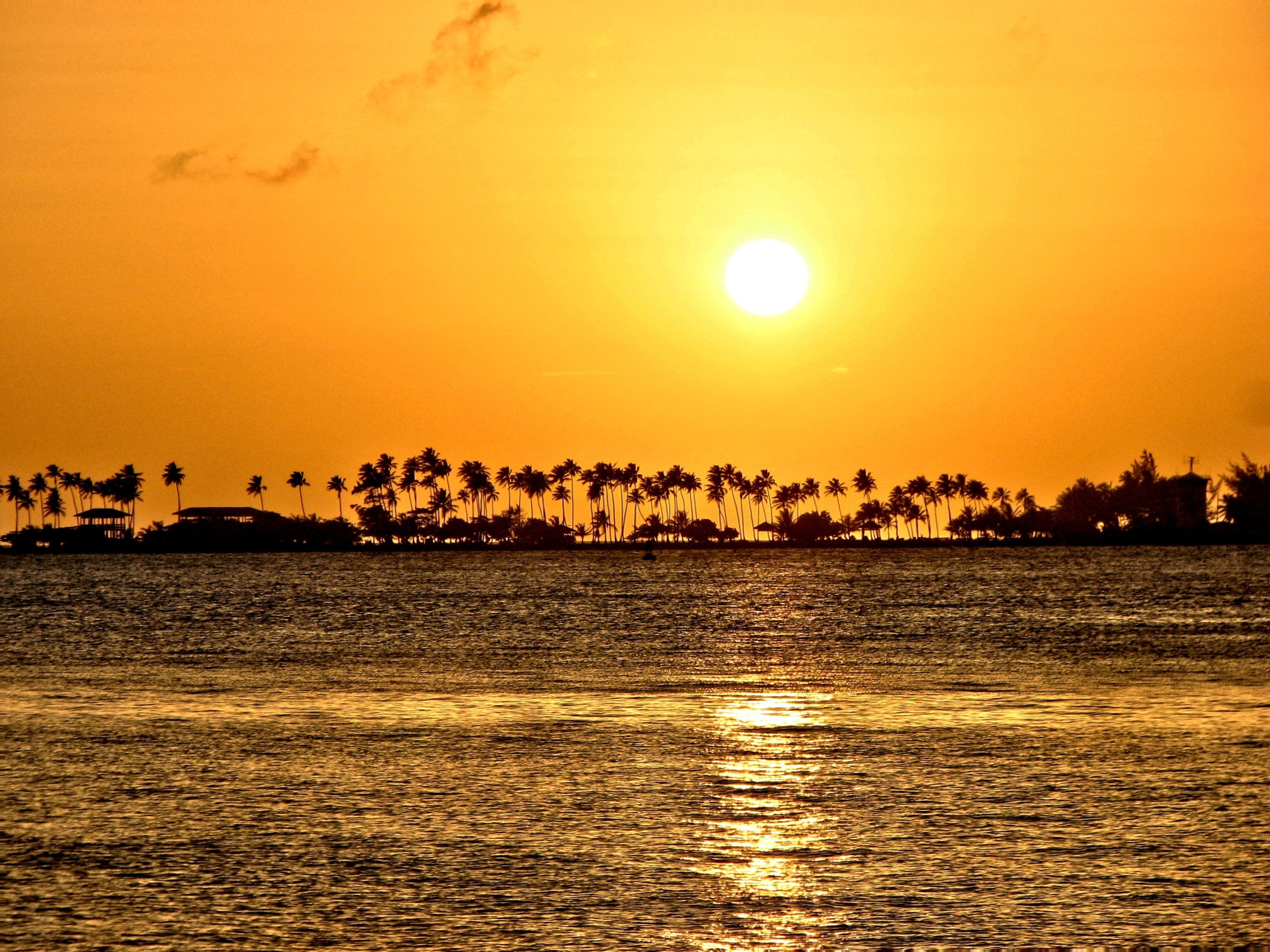 Isla de Cabras en Puerto Rico